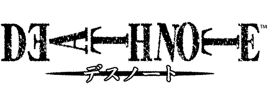 Logotipo oficial del manga y anime, Death Note